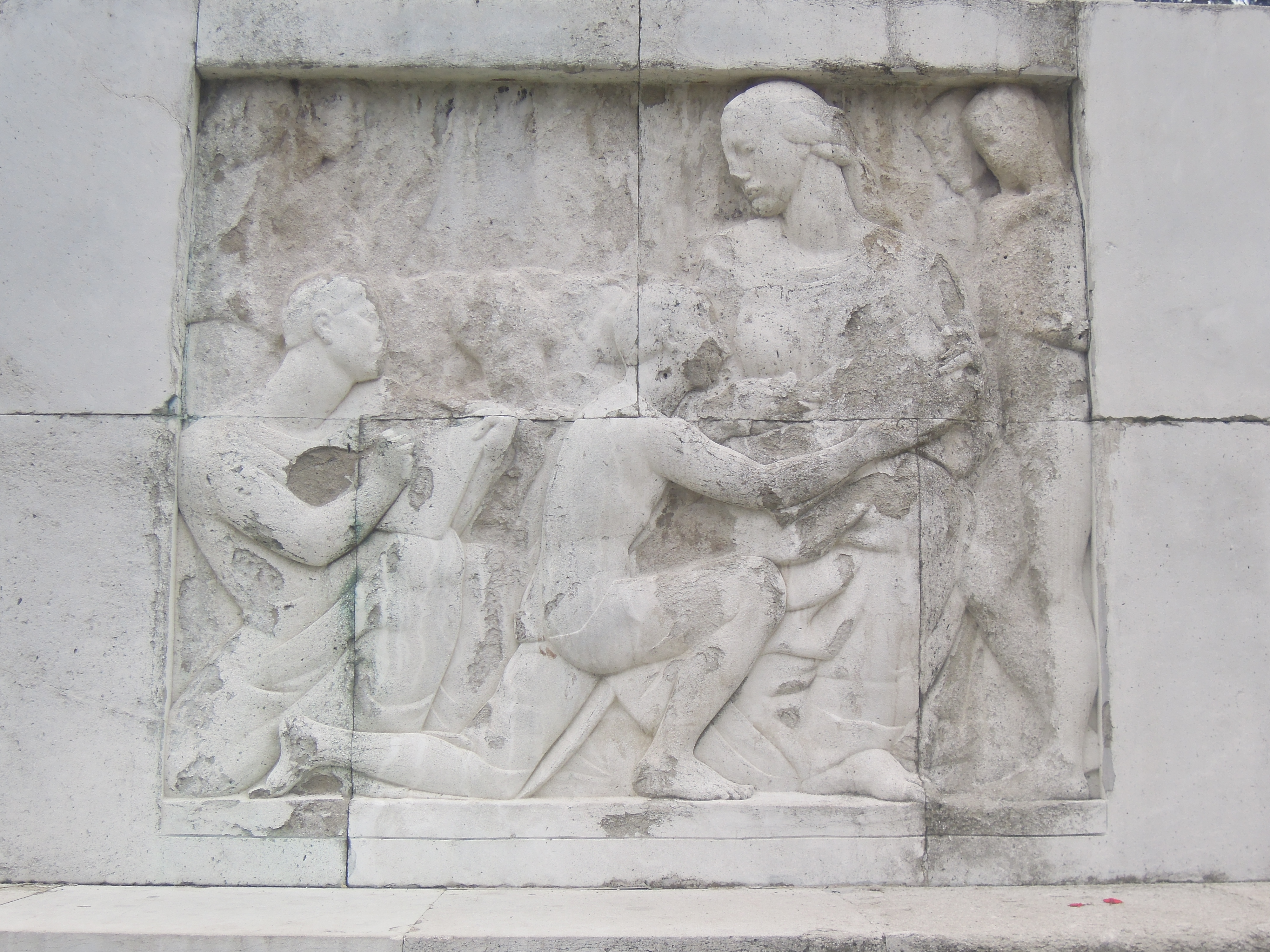 Споменик захвалности Француској на Калемегдану.